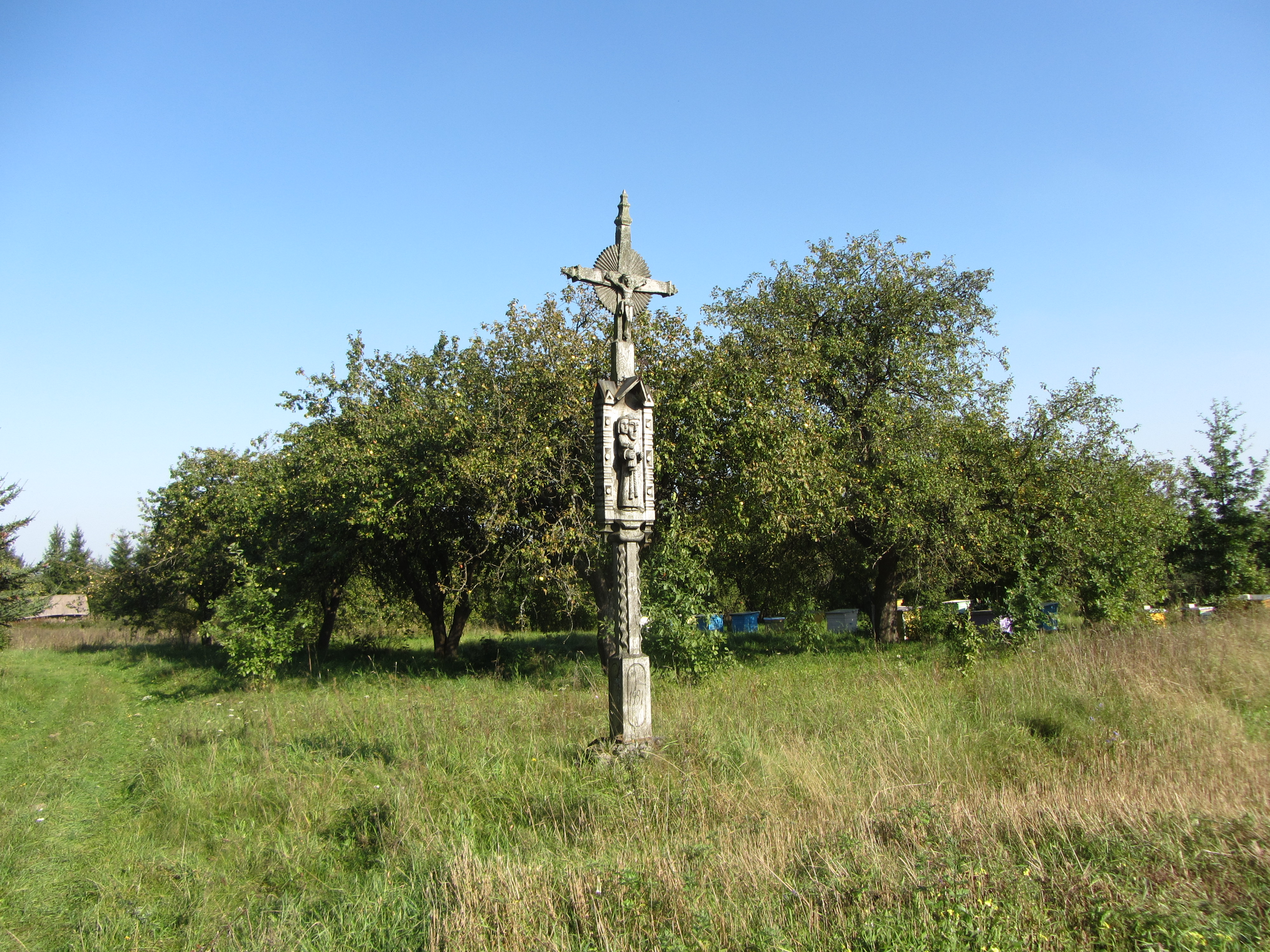 Jakėnų sen., Lithuania